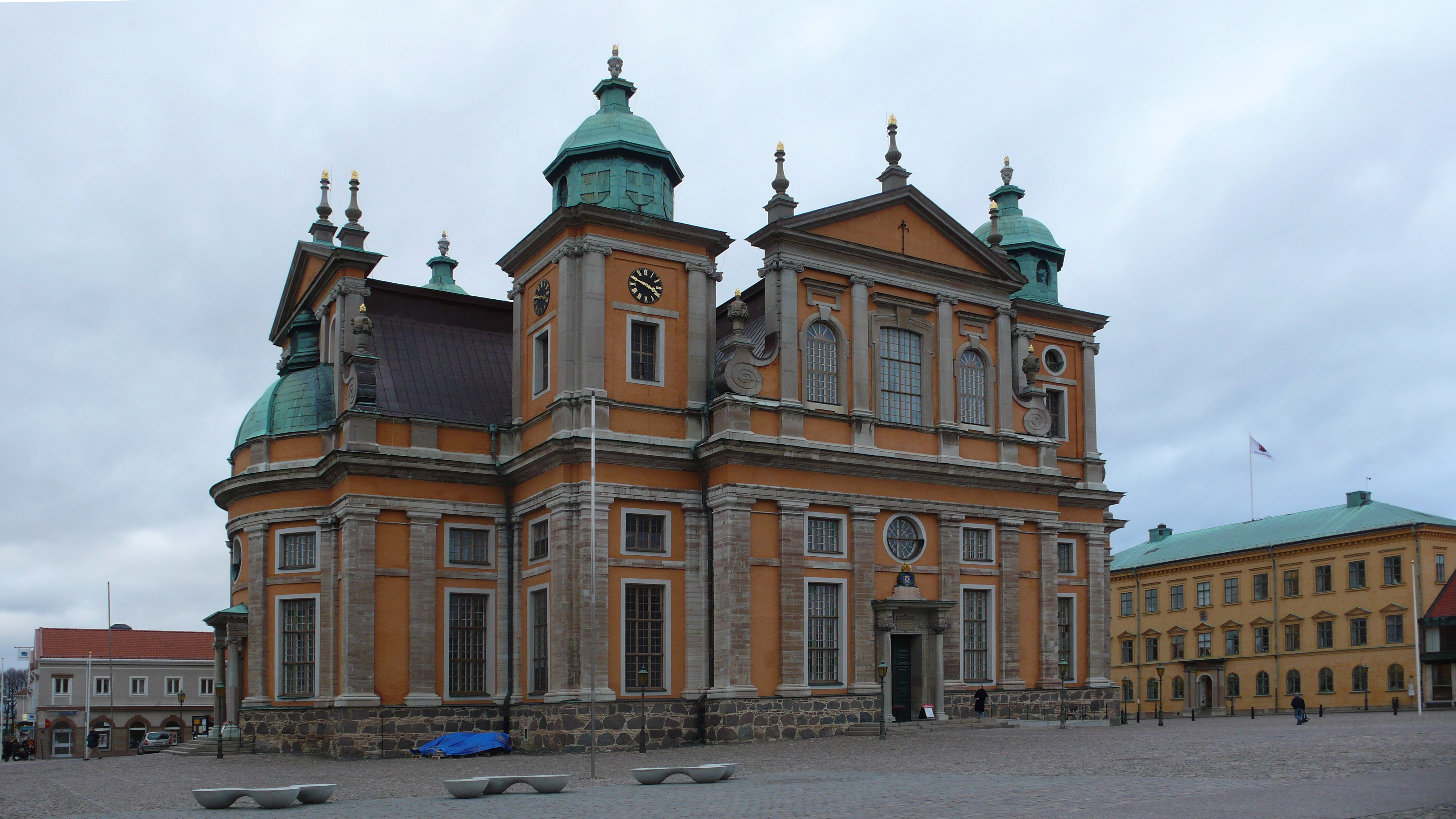 Dom zu Kalmar